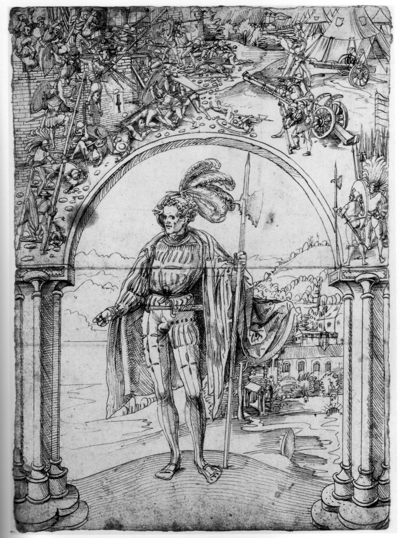 Eidgenosse unter einem Bogen mit dem Sturm auf die Festung Castellazzo. Der Eidgenosse trägt die Merkmale eines Knechts (Hellebarde) und eines Edelmannes (Schultermantel). Anspielung auf die zahlreichen eidgenössischen Teilnehmer am Zug des französischen Königs Ludwig XII. gegen Genua 1507, die nach der Eroberung zum Ritter geschlagen wurden. Die Spitze der Hellebarde zeigt auf einen gefallenen Hellebardier, das Schwert zeigt auf den Totenacker (memento mori).